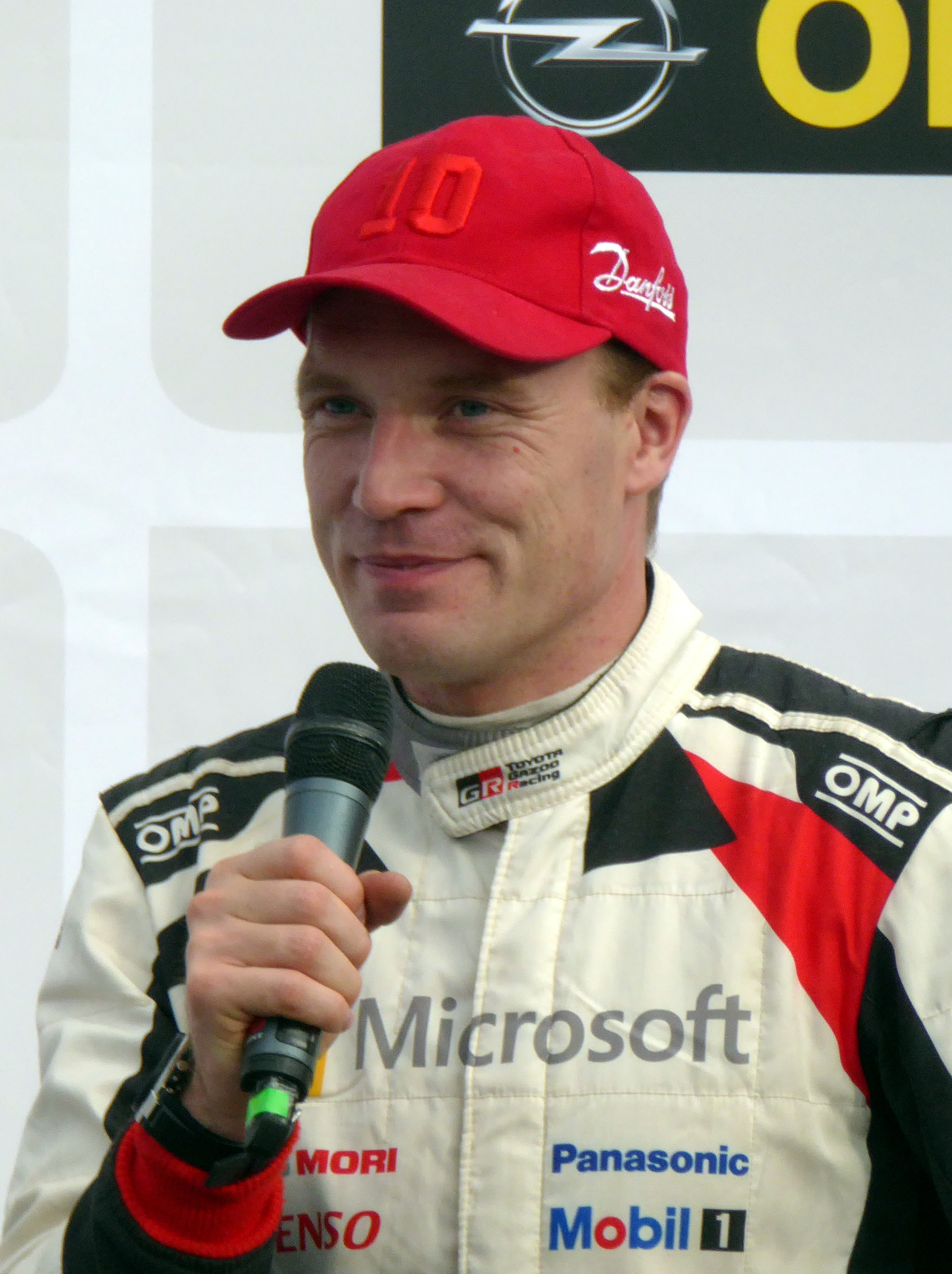 Rallye Deutschland 2017, Eröffnungszeremonie auf dem Tbilisser Platz in Saarbrücken